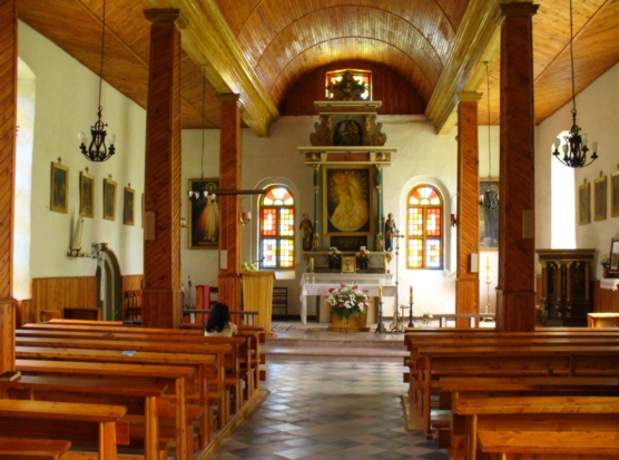 Rydzewo